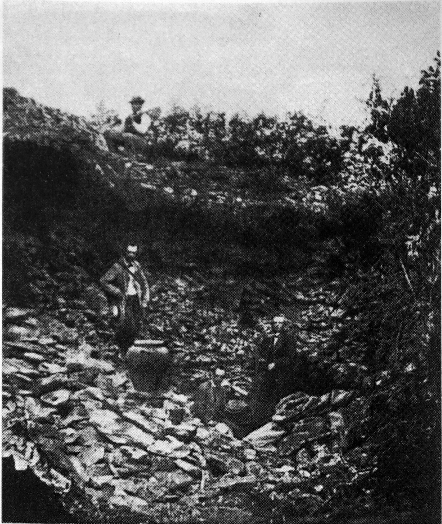 sur une vue ancienne.